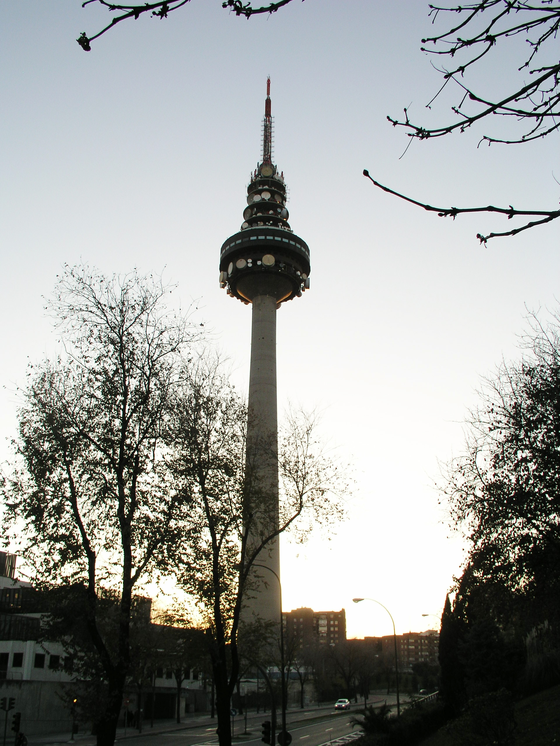 El Pirulí, Madrid, Spain